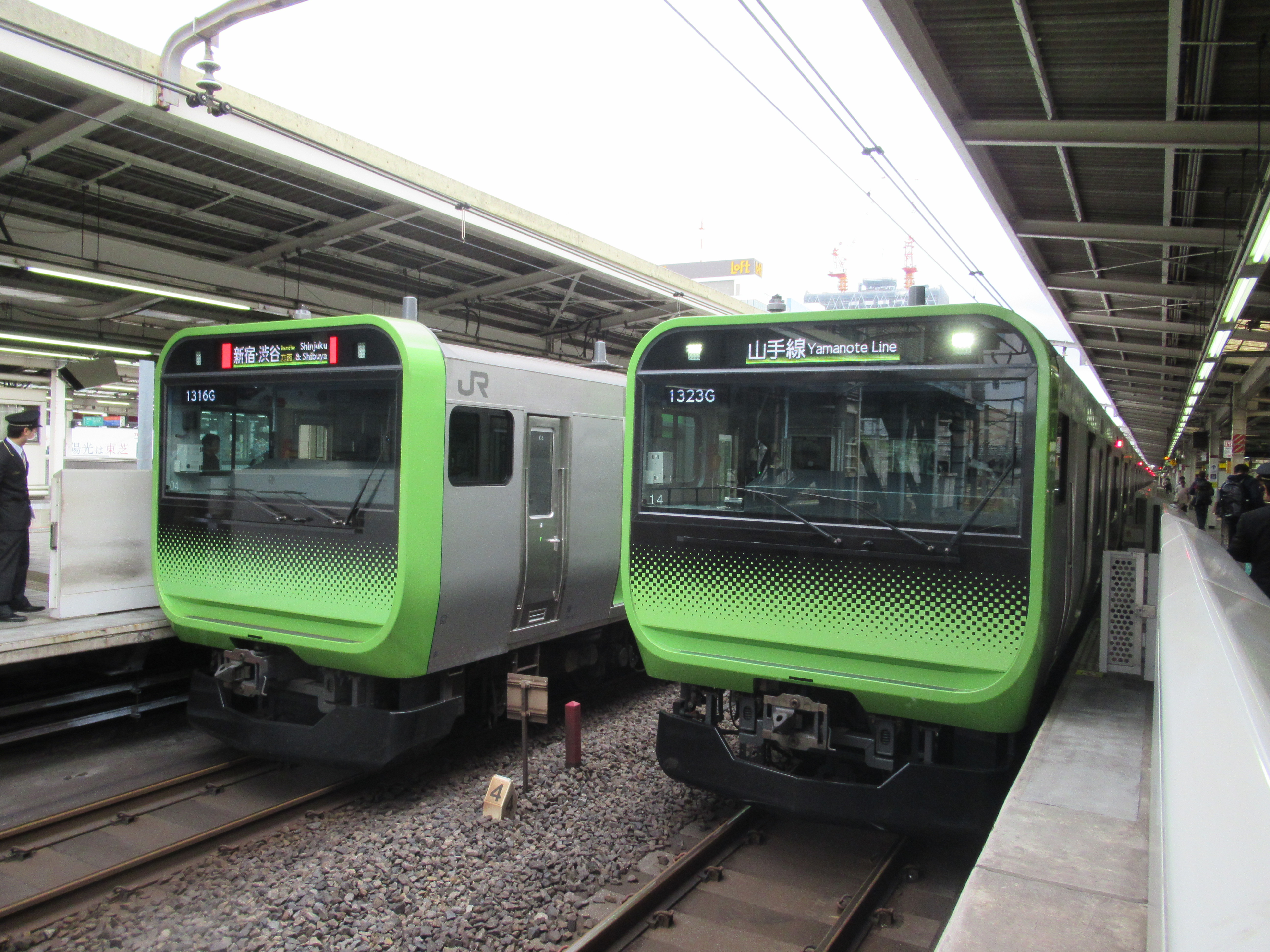 池袋駅で並んだE235系電車